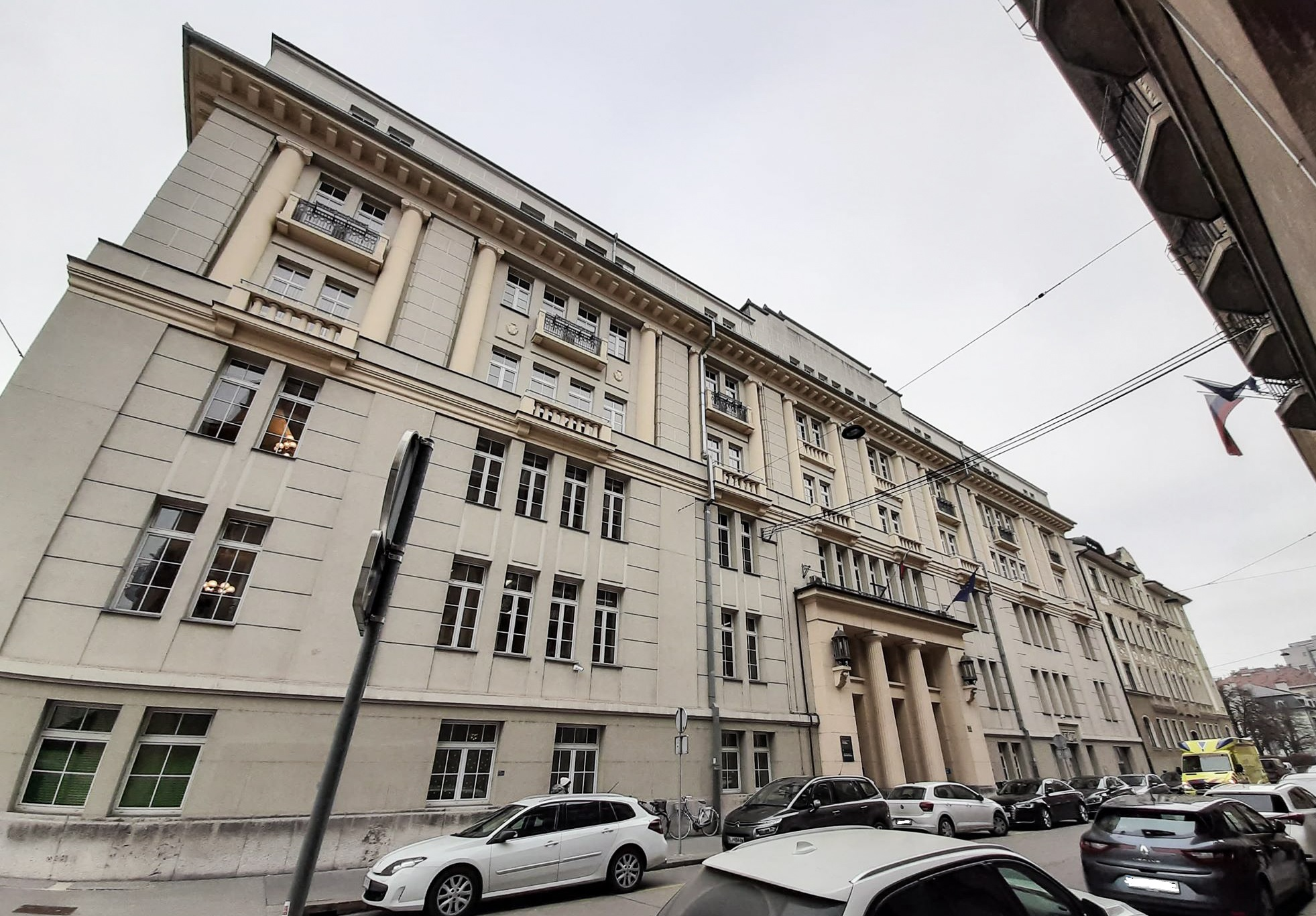 Ministrstvo za finance Republike Slovenije Ministrstvo za pravosodje Republike Slovenije Župančičeva ulica 3 1000 Ljubljana